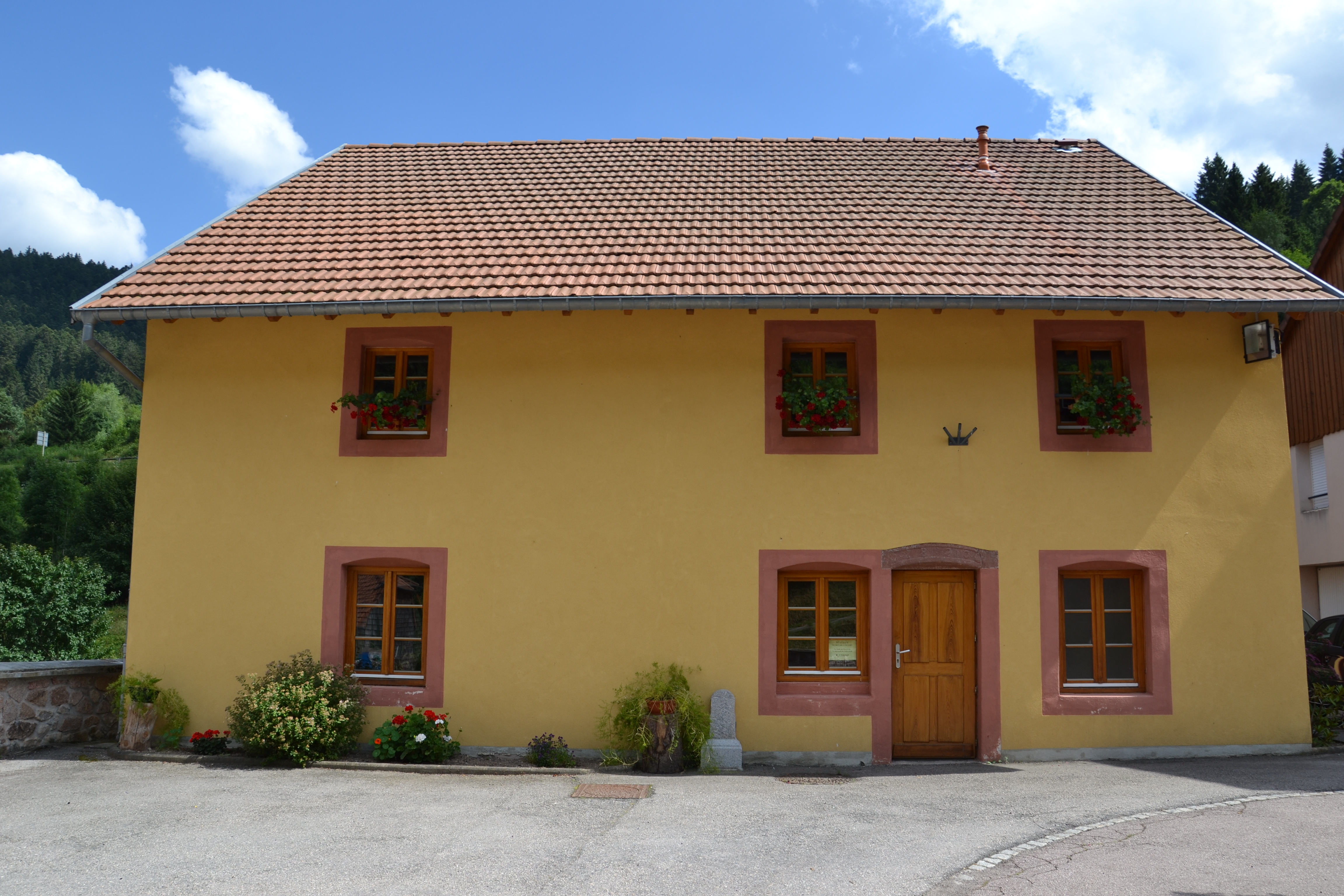 Mairie du Valtin en 2013.